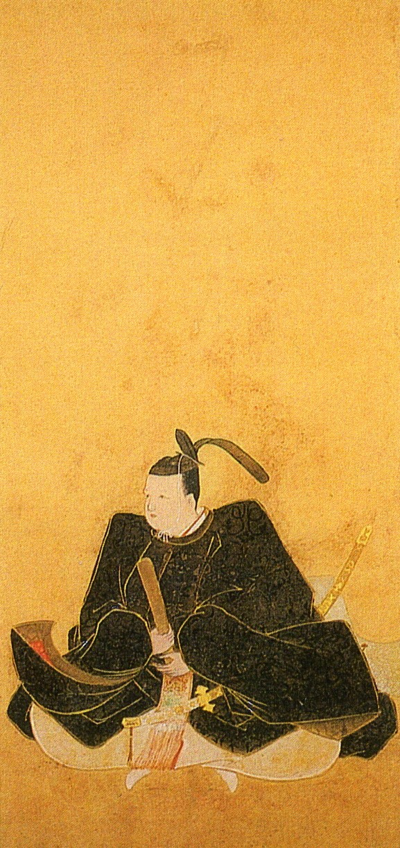 丹羽長之の肖像画(市指定文化財)。